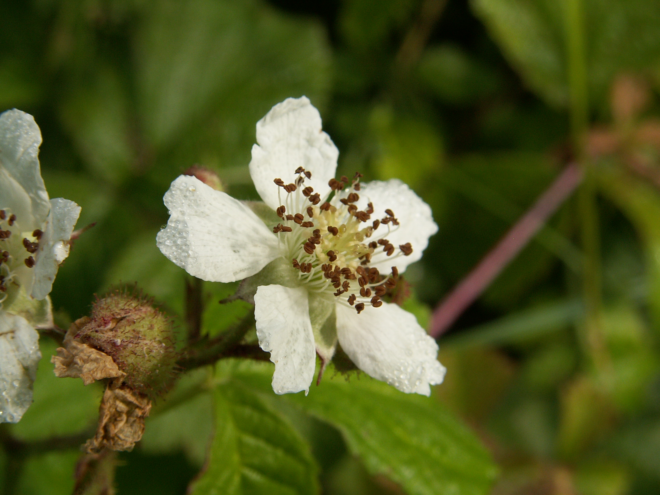 Rubus caesius NRM